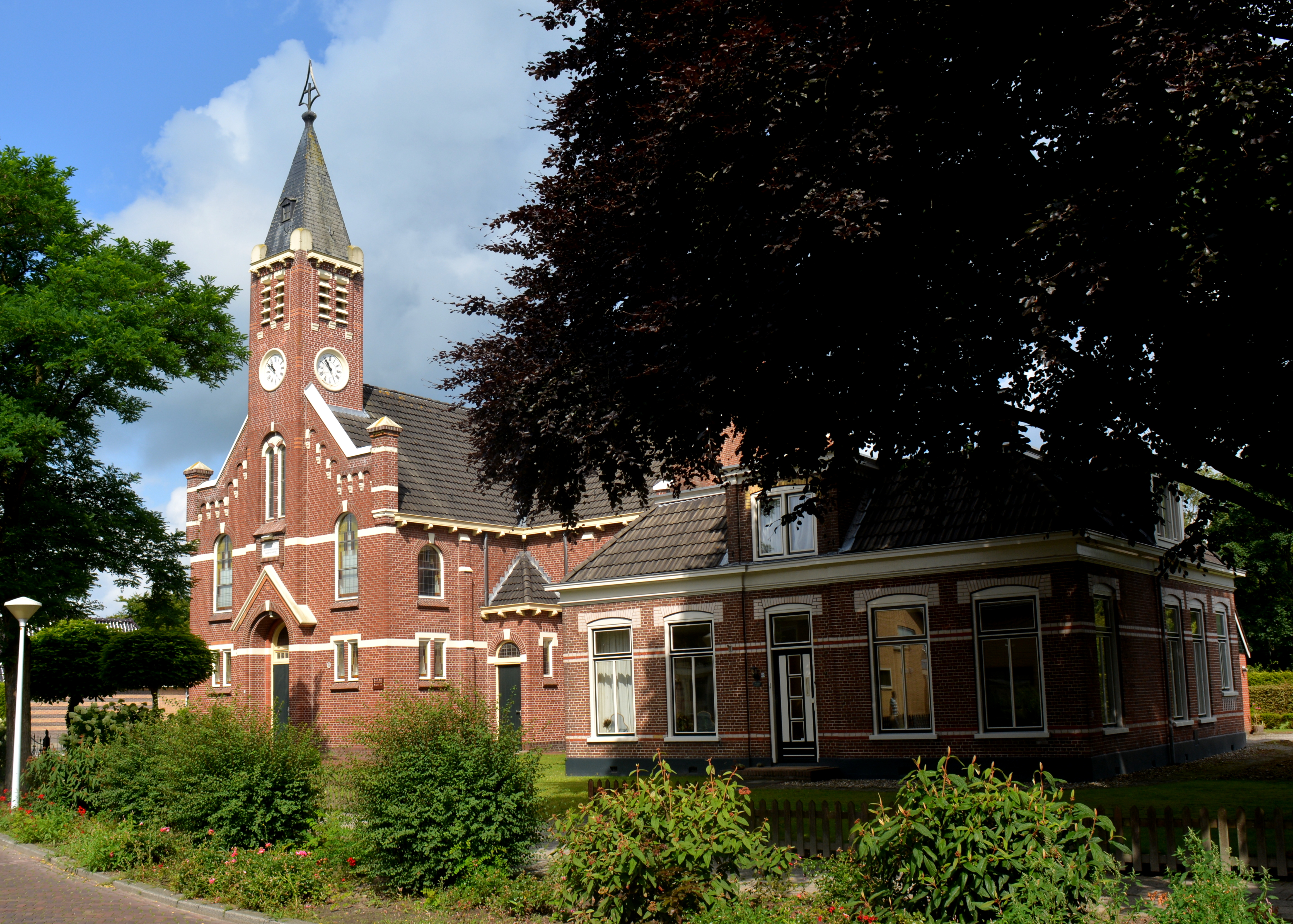 Harkema, geref. kerk met vroegere pastorie (later woning koster)